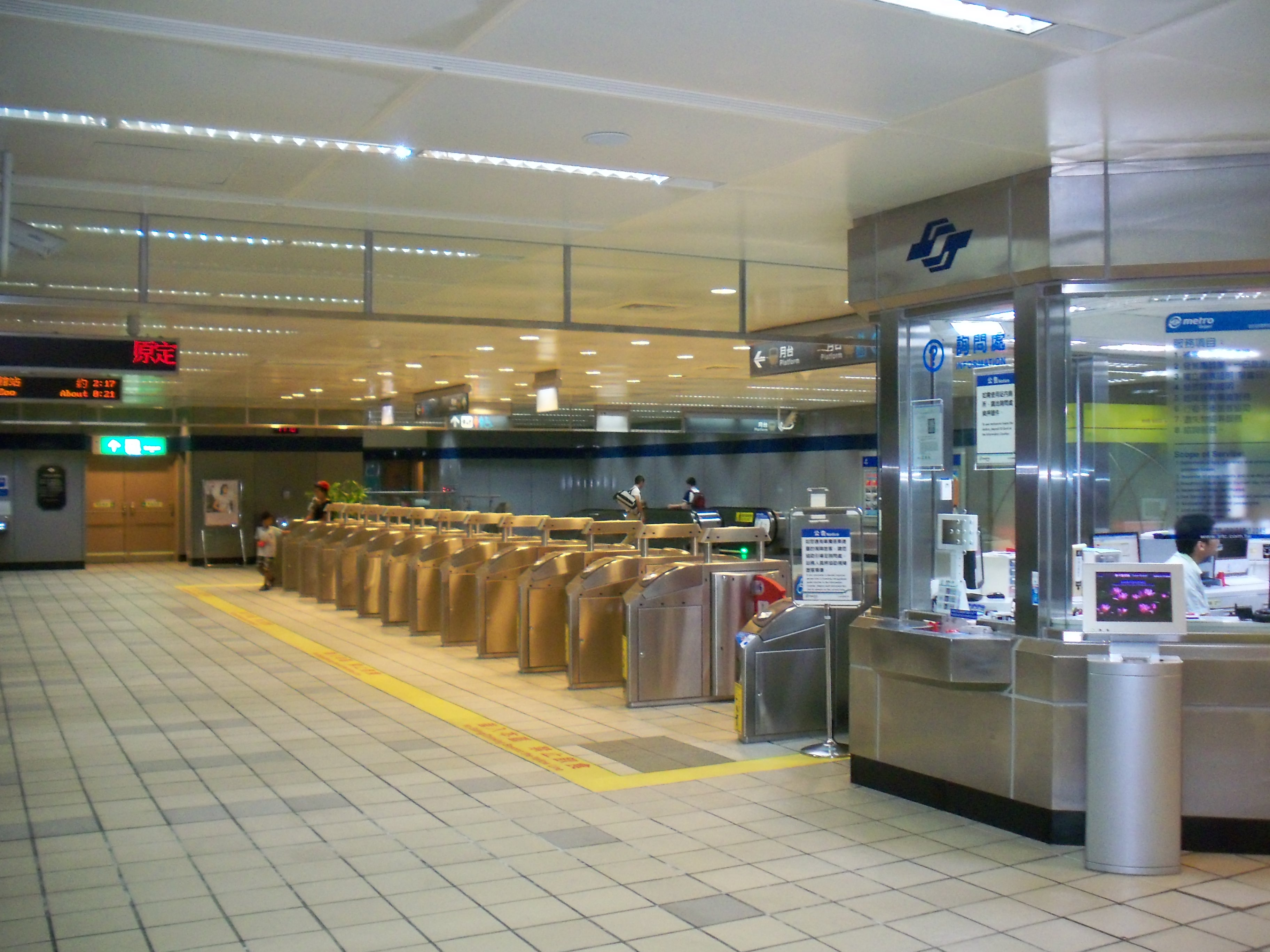 台北捷運内湖線松山機場駅地下2階改札口。